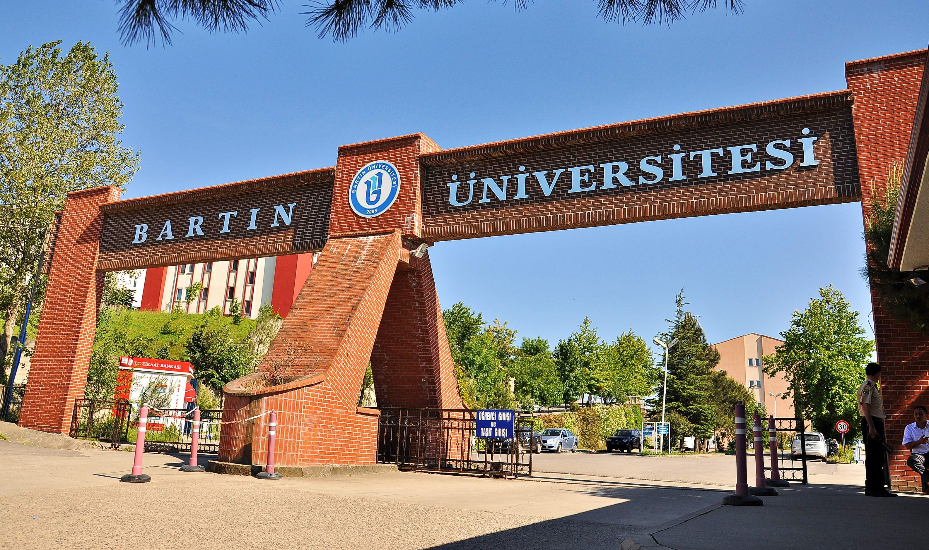 Bartın Üniversitesi, Ağdacı Kampüsü